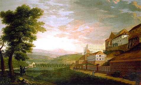 Esta panorámica del Palacio Real de Madrid de principios del siglo XIX muestra la gran mole del palacio desde el ángulo suroeste, apreciándose la mitad de la fachada de la plaza de la Armería y el lienzo occidental con los jardines del Campo del Moro. A la derecha y dentro de la cerca de mampostería y ladrillo que circunvalaba la ciudad de Madrid, se aprecia el desaparecido edificio de la Real Armería, incendiado en 1884, y las Caballerizas, en cuyo emplazamiento se alza hoy la catedral de la Almudena. En el lado izquierdo se advierte la silueta de la Puerta de San Vicente y, algo más atrás, un pequeño templo, la ermita de San Antonio de la Florida. Por detrás del palacio asoma la Montaña del Príncipe Pío.